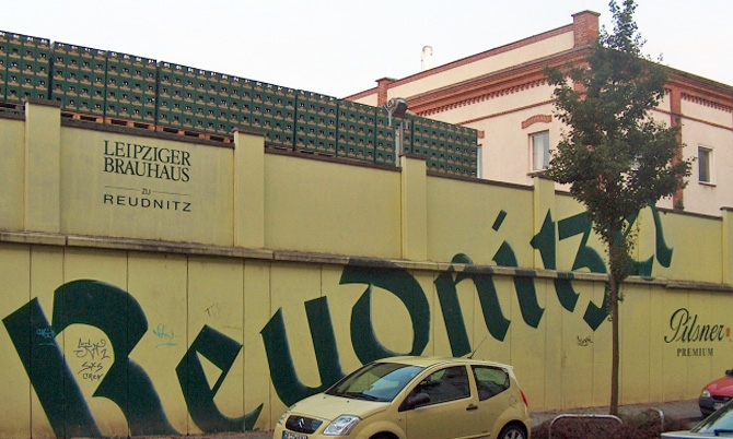 Reudnitzer Brauerei, Schulze-Boysen-Straße